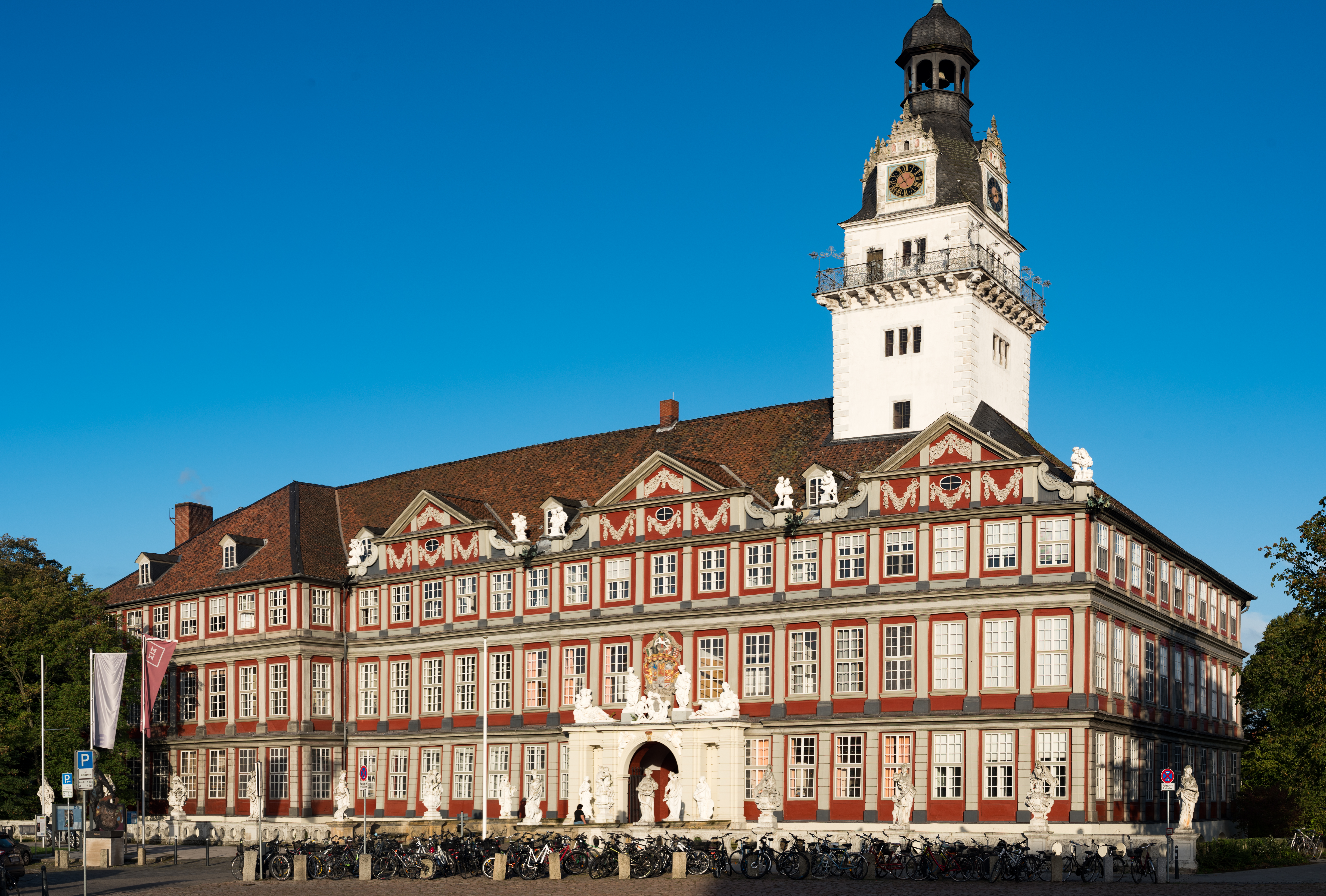 Wolfenbüttel, Schloss